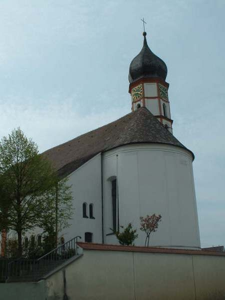 Achstetten, Parish Church St Oswald